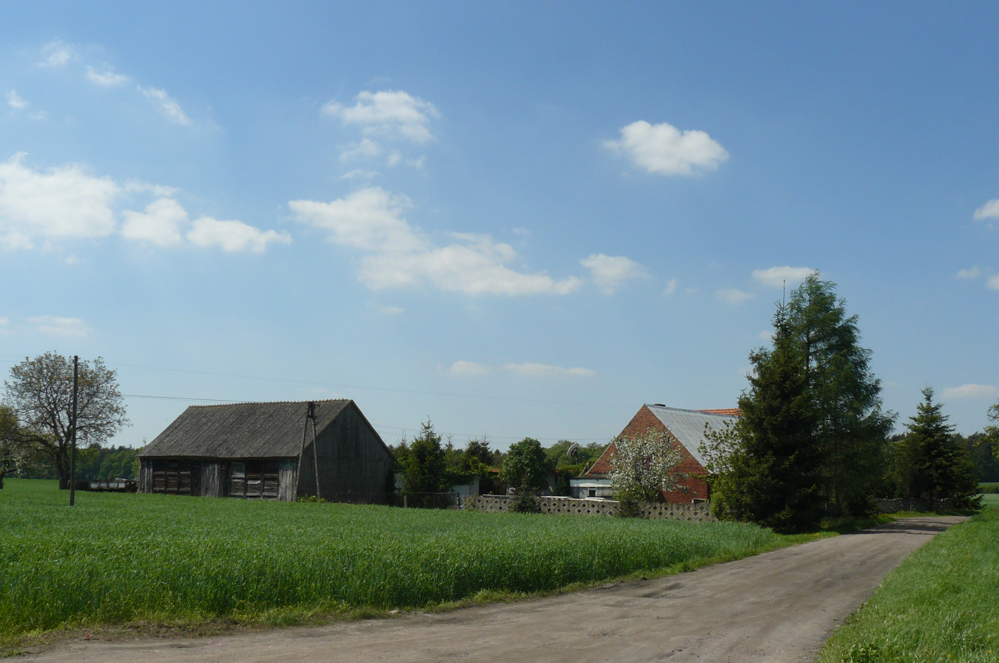 Wieś Białęgi.